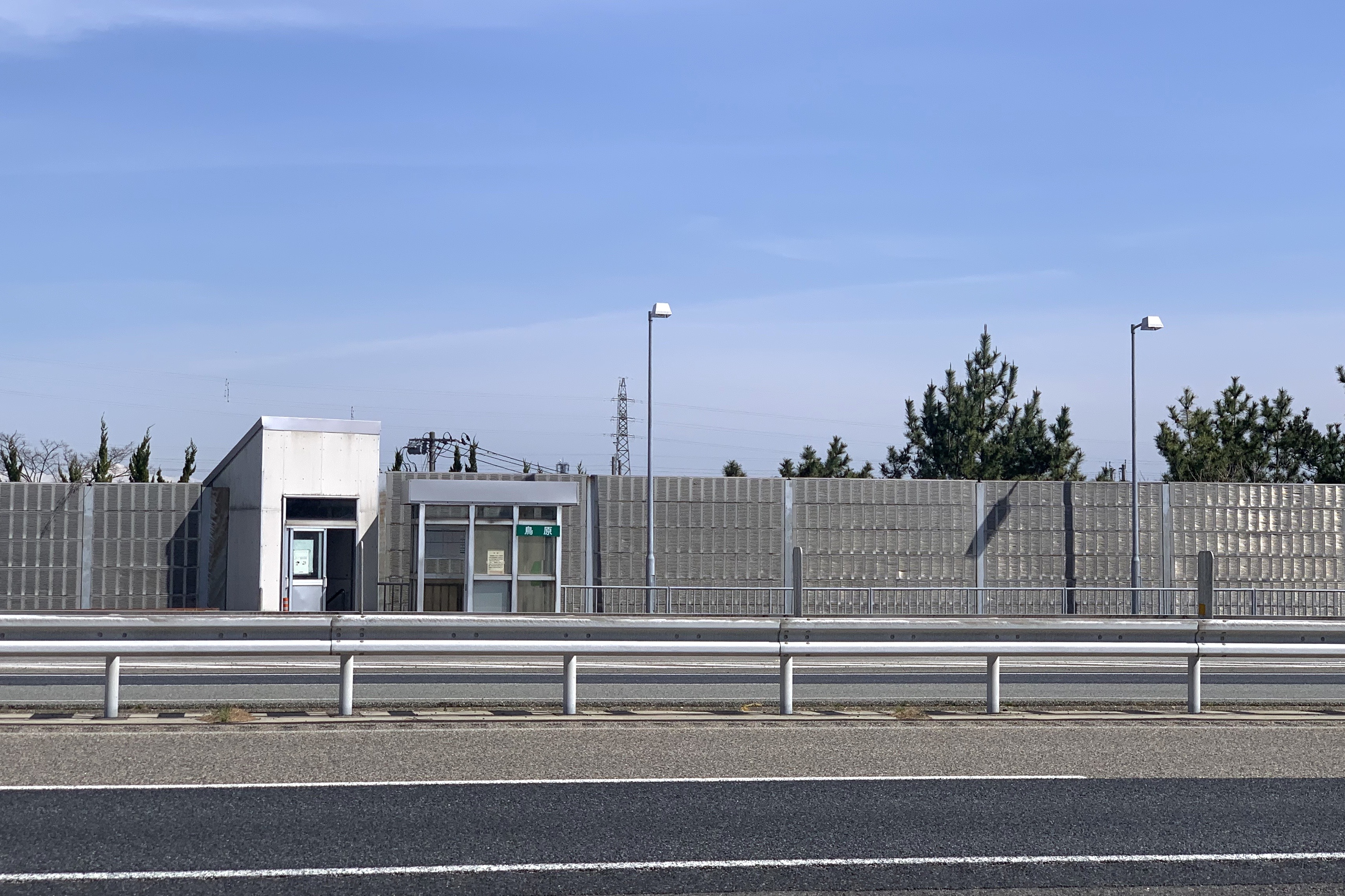 北陸自動車道・鳥原バスストップ 長岡方面行のりば（2020年3月）